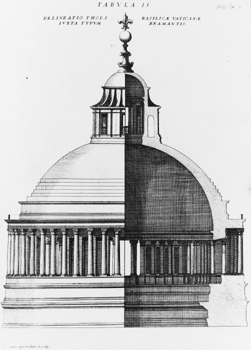 Cupola progettata da Donato Bramante per la Basilica di San Pietro